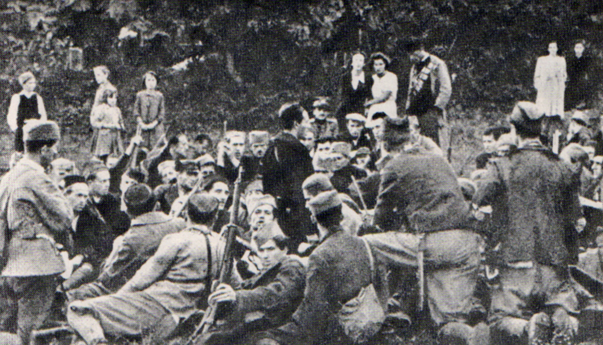 Srpskohrvatski / српскохрватски: Rade Azanjac govori okupljenim ustanicima u šumi kraj Čačka.